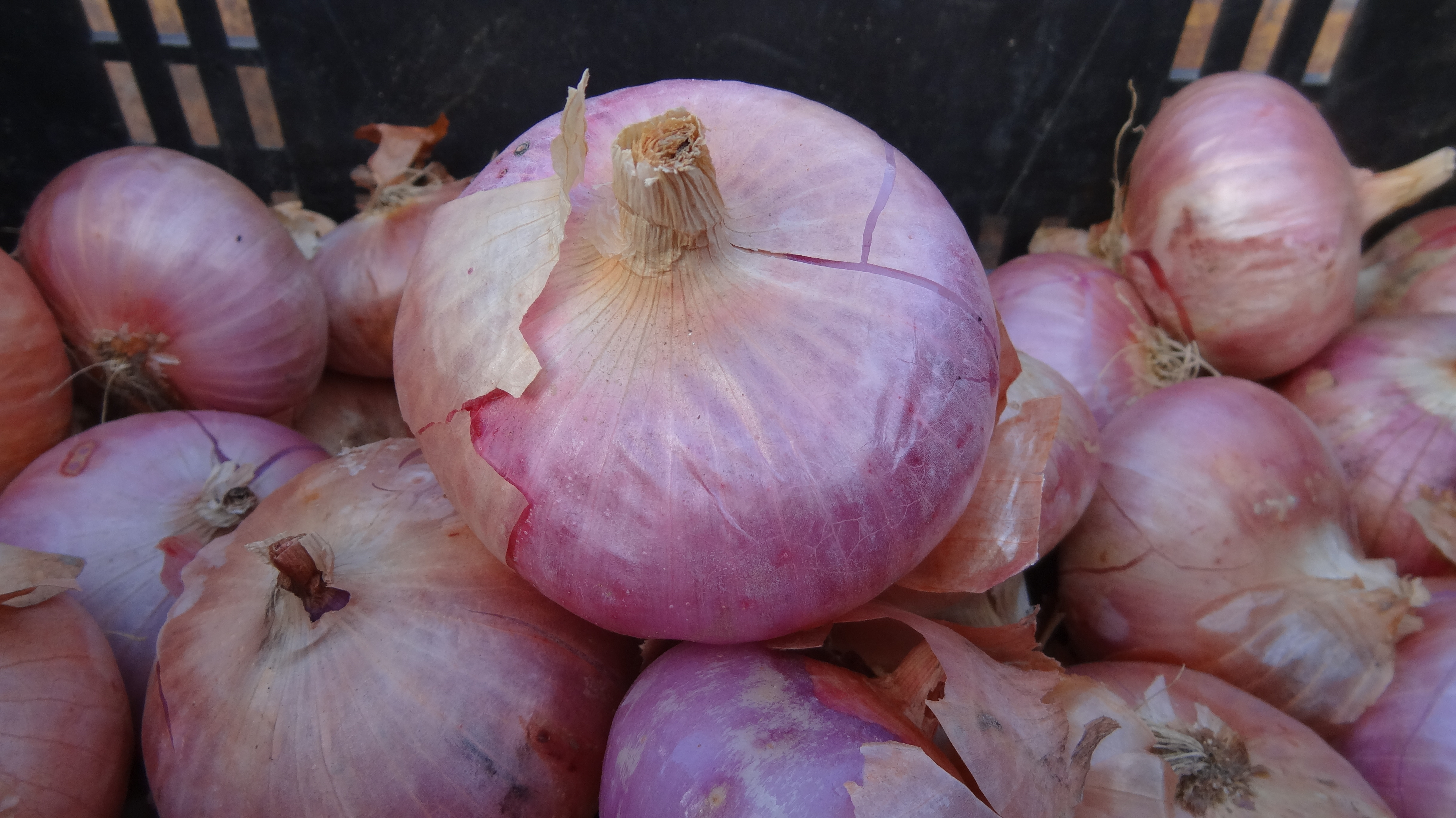 Ceba de figueres de la finca Can Bosc del Baró. Varietat de ceba típica de l'Empordà caracteritzada per la forma una mica aplanada, lleuger color lilós i gust dolç